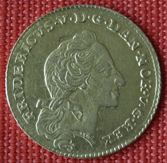 Kurant-Dukat mit dem Konterfei Frederik V. aus dem Jahr 1762.